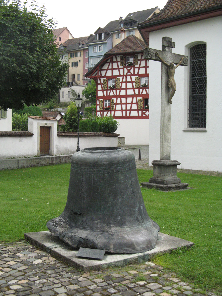 Geschmolzene Glocke neben der Stadtkirche